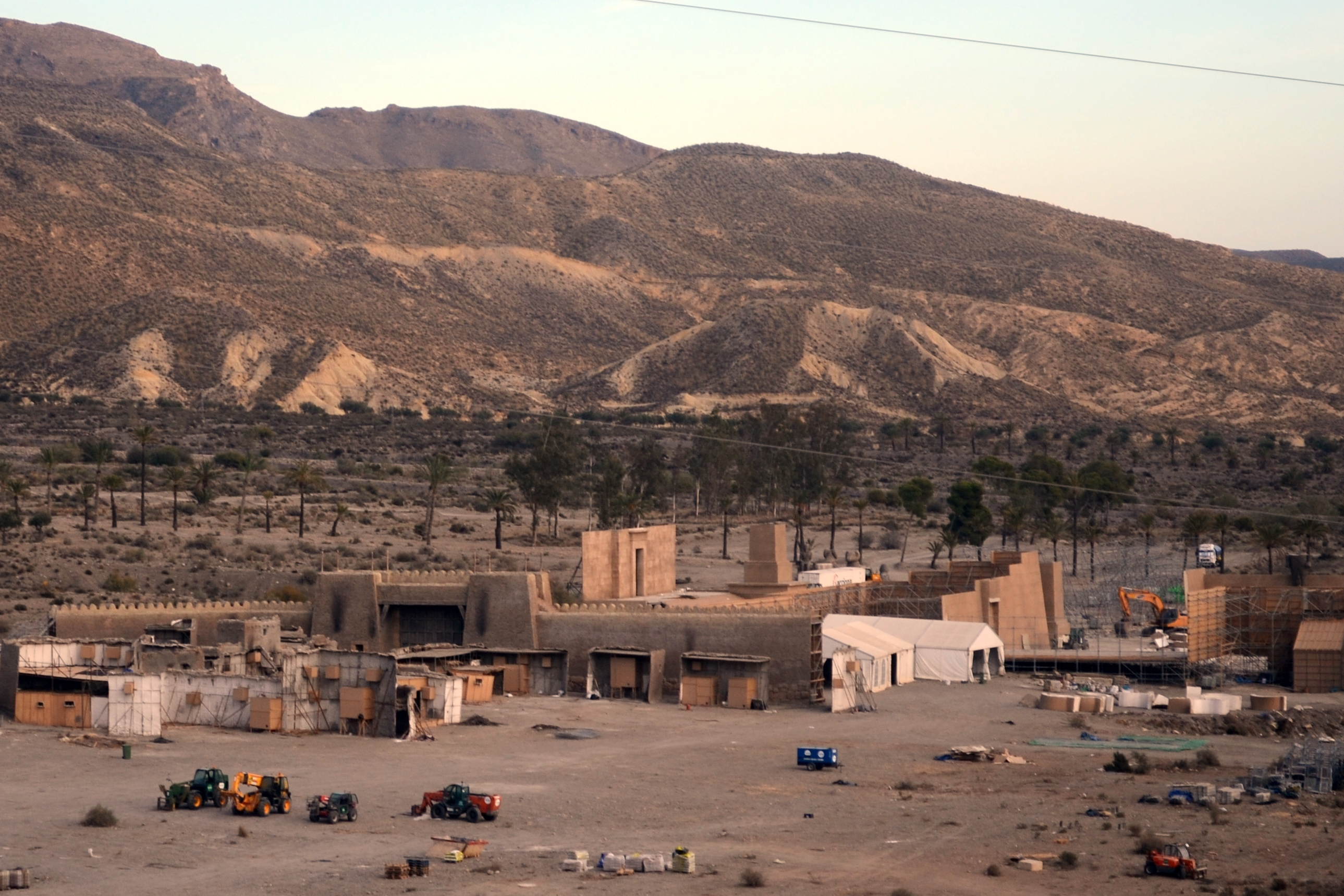 Decorados para la película "Exodus" de Ridley Scott en el paraje El Chorrillo, situado en Sierra Alhamilla (término municipal de Pechina), Almería. Recrean el Egipto del faraón Ramsés II. Tomadas el 23 de noviembre, durante su desmontado tras acabar el rodaje en Almería.